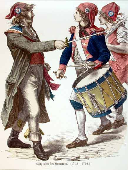 colorierter Stich aus dem 19. Jahrhundert, Männer mit Jakobinermützen darstellen, zum Teil ohne, zum Teil mit Culotte.